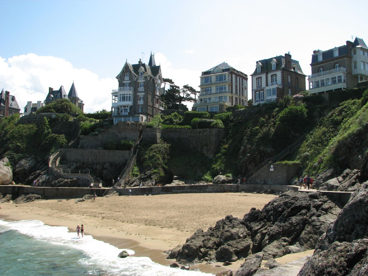 Villas vues de la plage de la Malouine, Dinard.